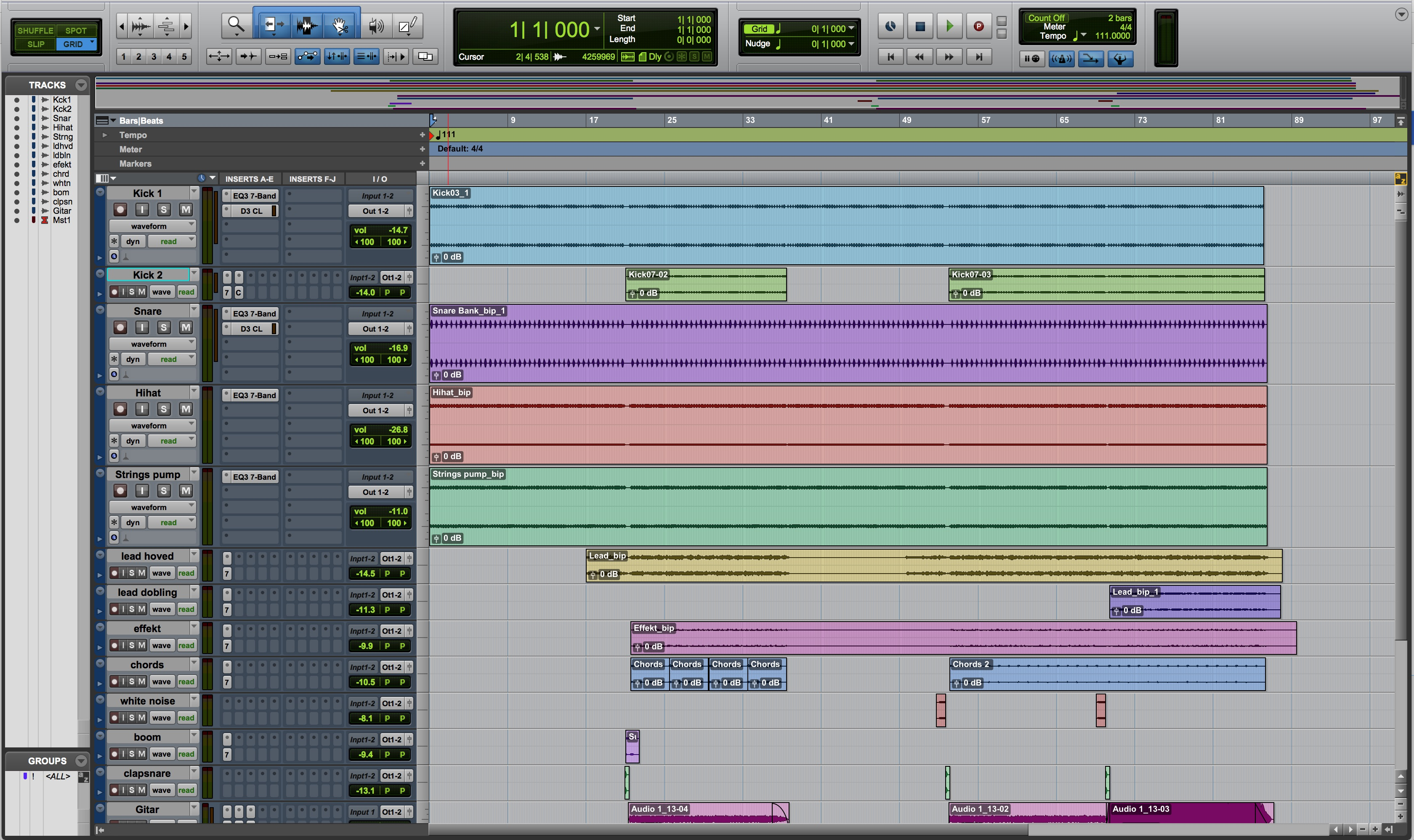 Så här ser edit fönster ut.